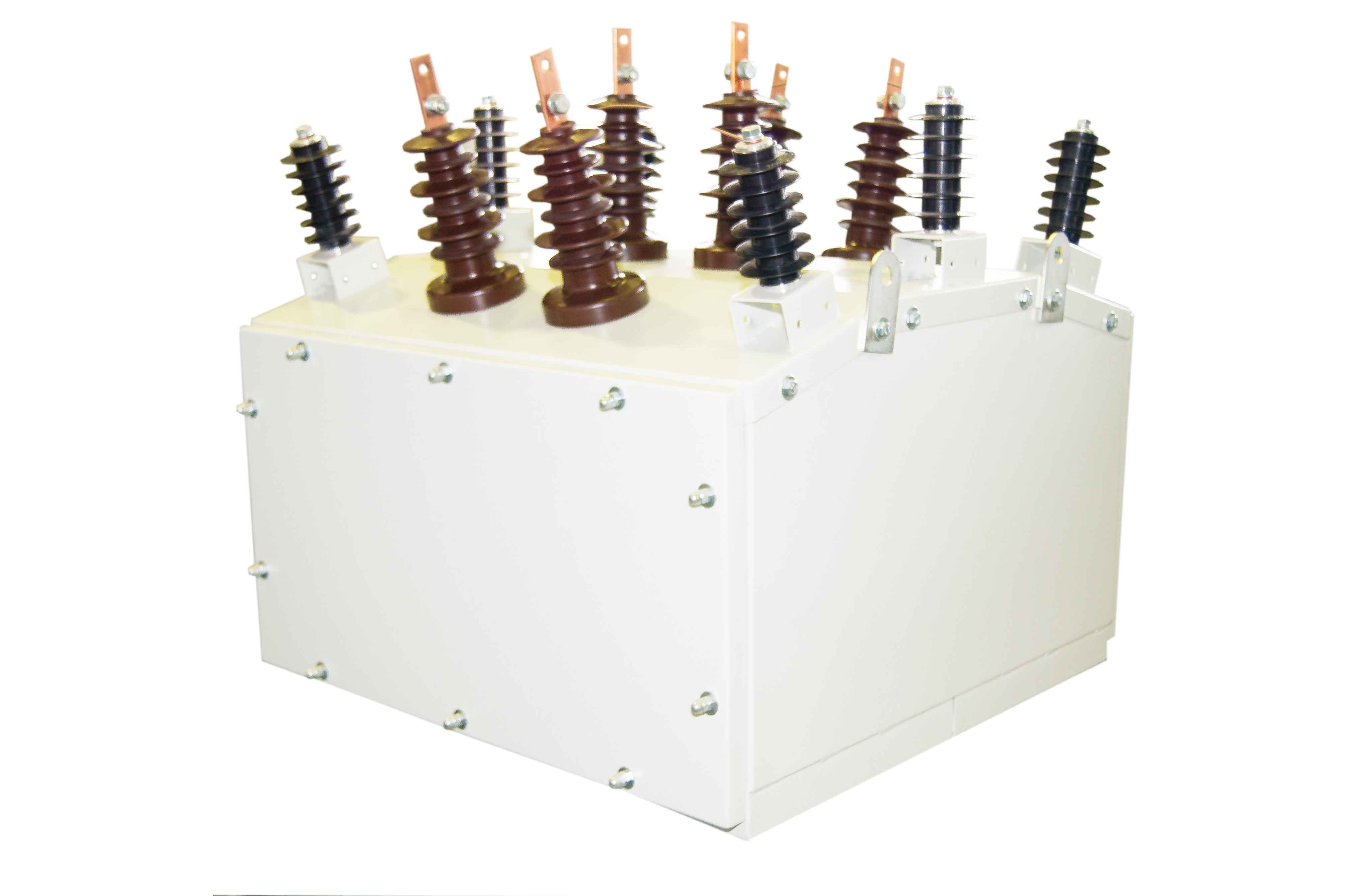 Реклоузер К-123С на 6(10) кВ